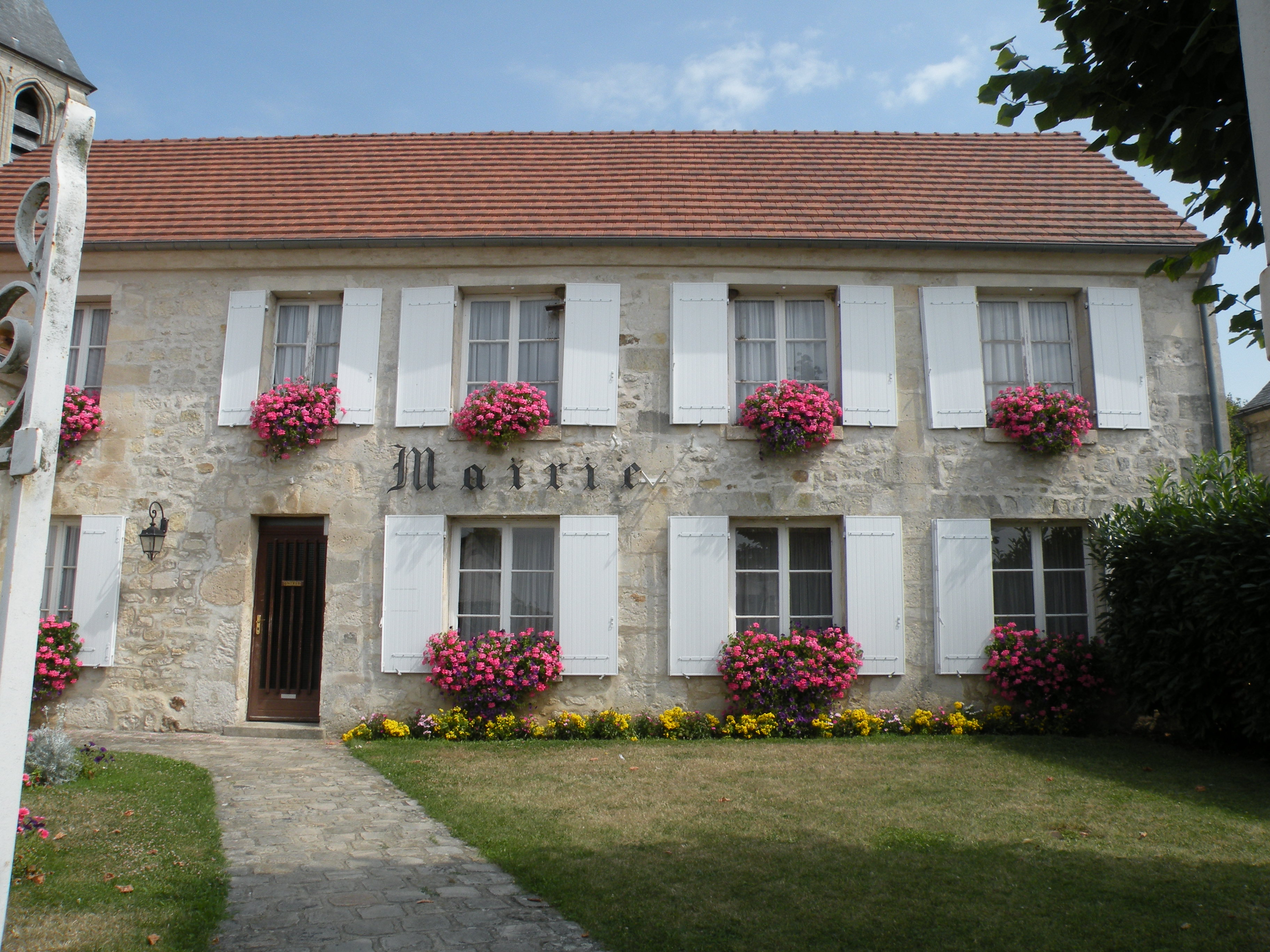 mairie d'arronville, val d'oise france